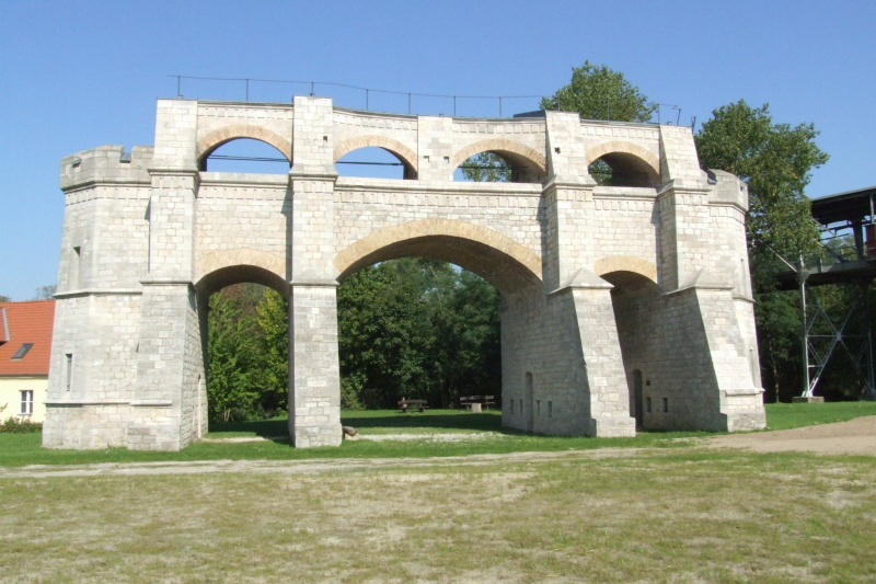 Museumsbark Rüdersdorf: Seilscheibenpfeiler Fotograf: Harald Rossa Datum: 3. Oktober 2006 Höher aufgelöste Version ist verfügbar